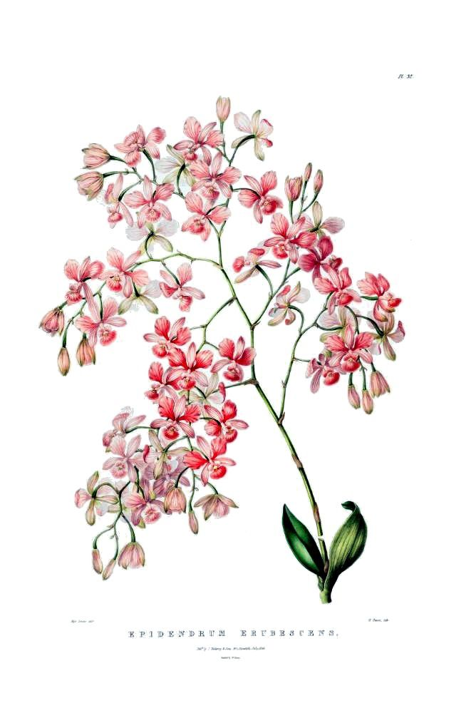 Illustration of Artorima erubescens (Orig. syn: Epidendrum erubescens)